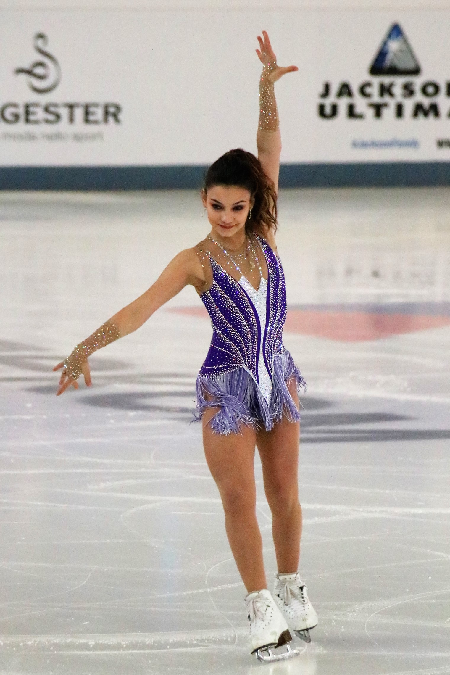 Софья Самодурова на чемпионате России по фигурному катанию на коньках 2019